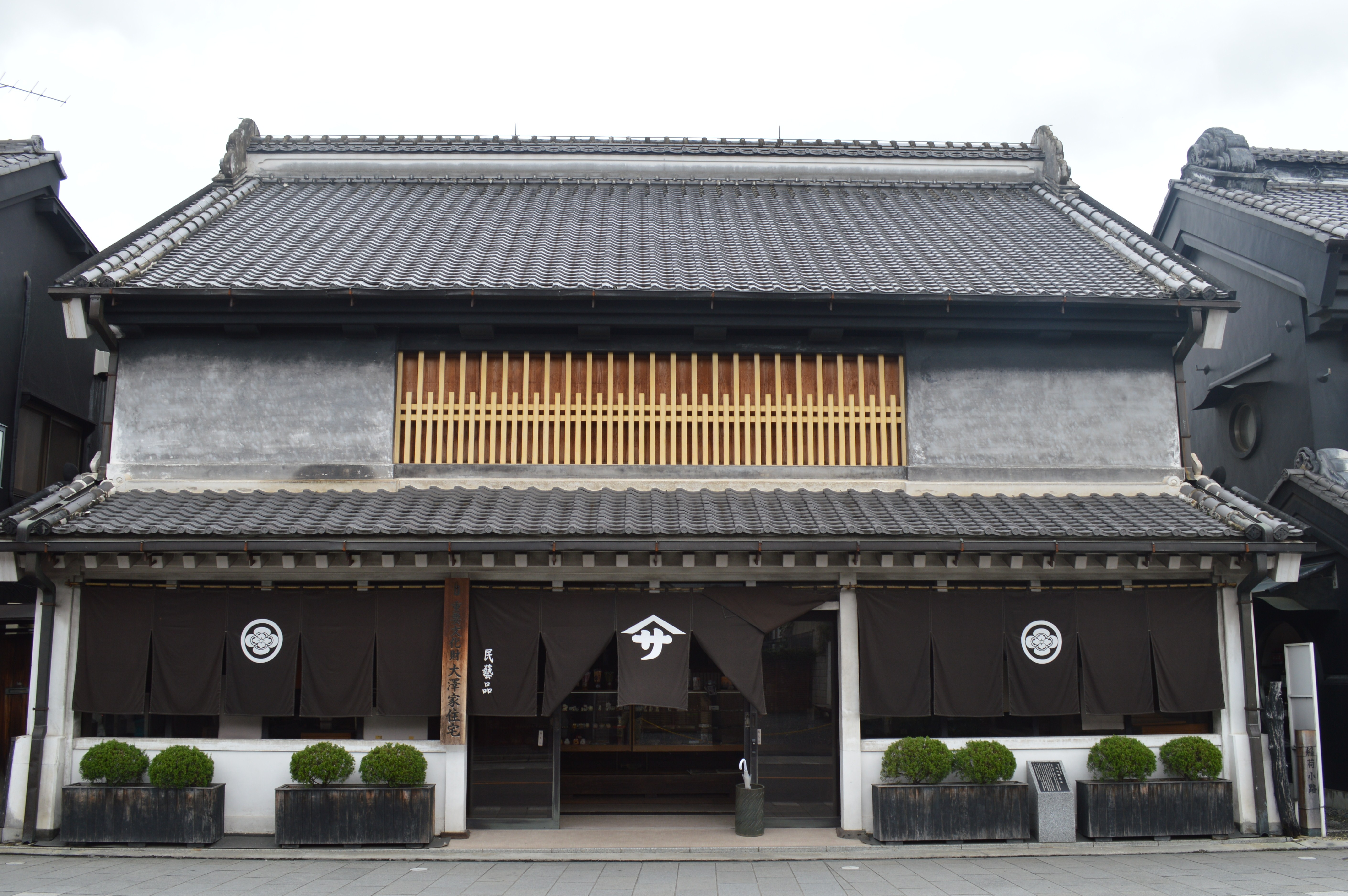 埼玉県川越市の重伝建地区にある大沢家住宅